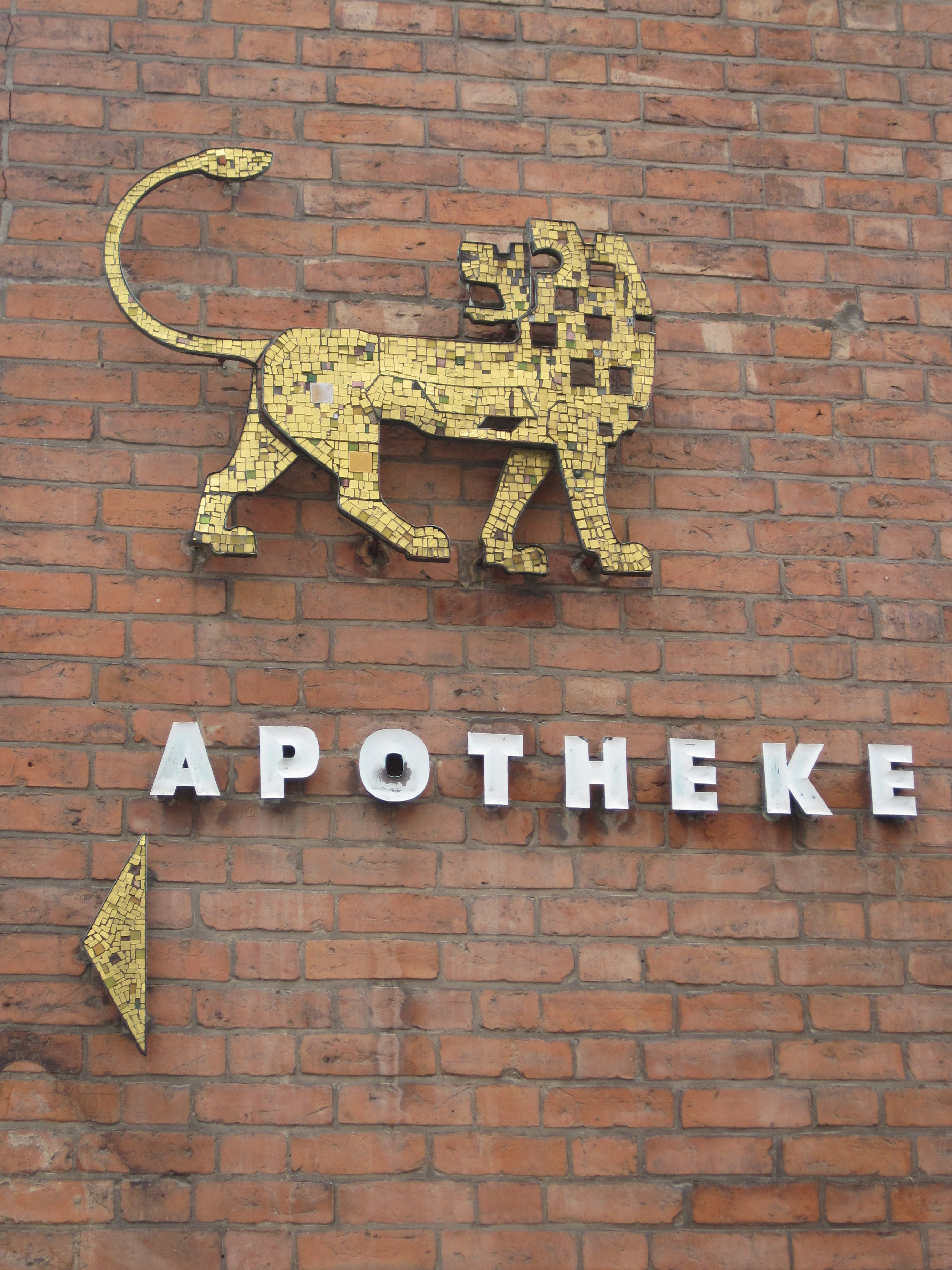 Löwenmosaik an der Rückfassade der Löwenapotheke in Lübeck gestaltet von Herbert Müller-Fried.